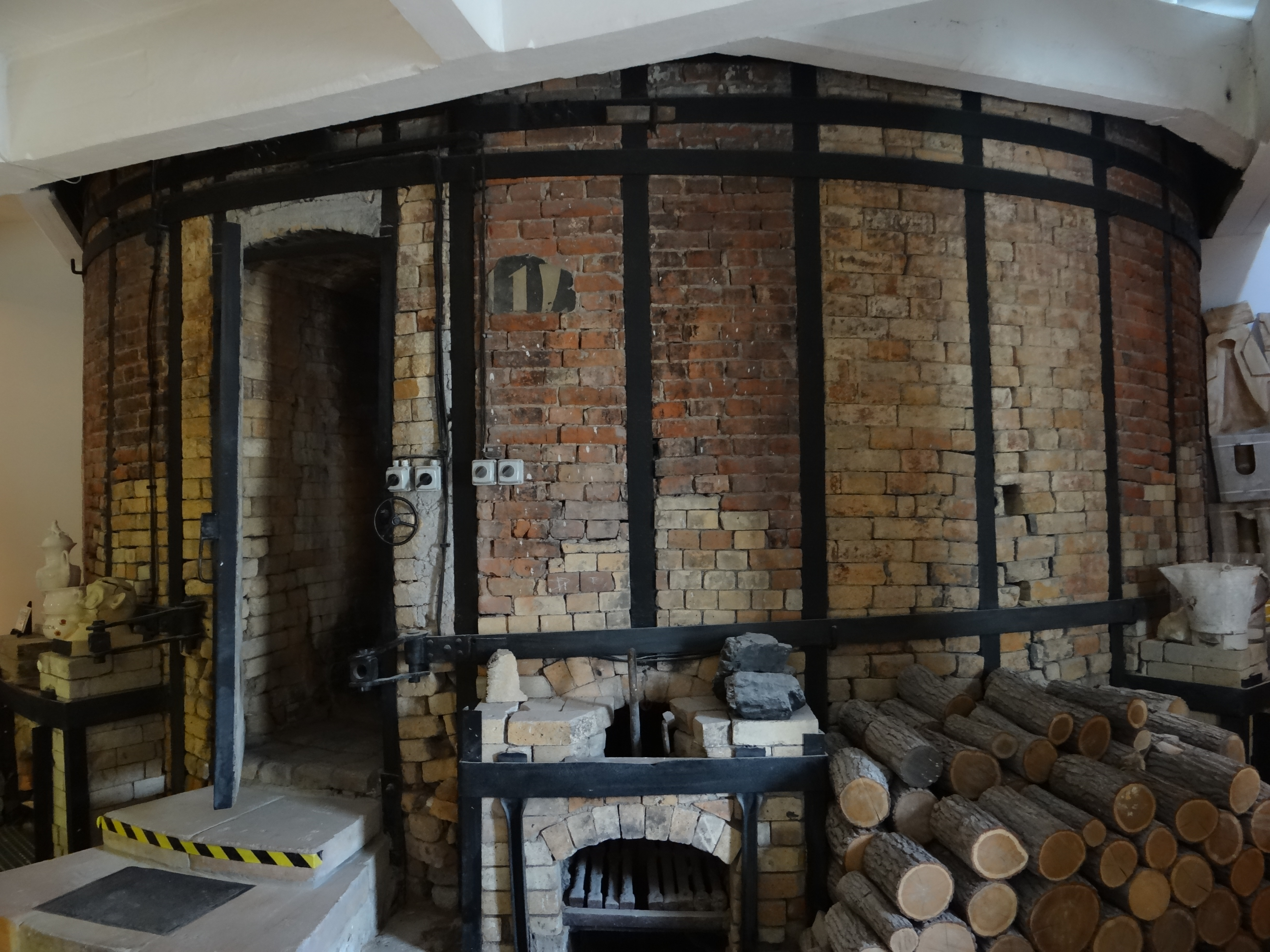 Żywe Muzeum Porcelany w Ćmielowie. Fabryka Porcelany AS. Nieużywany piec węglowy.